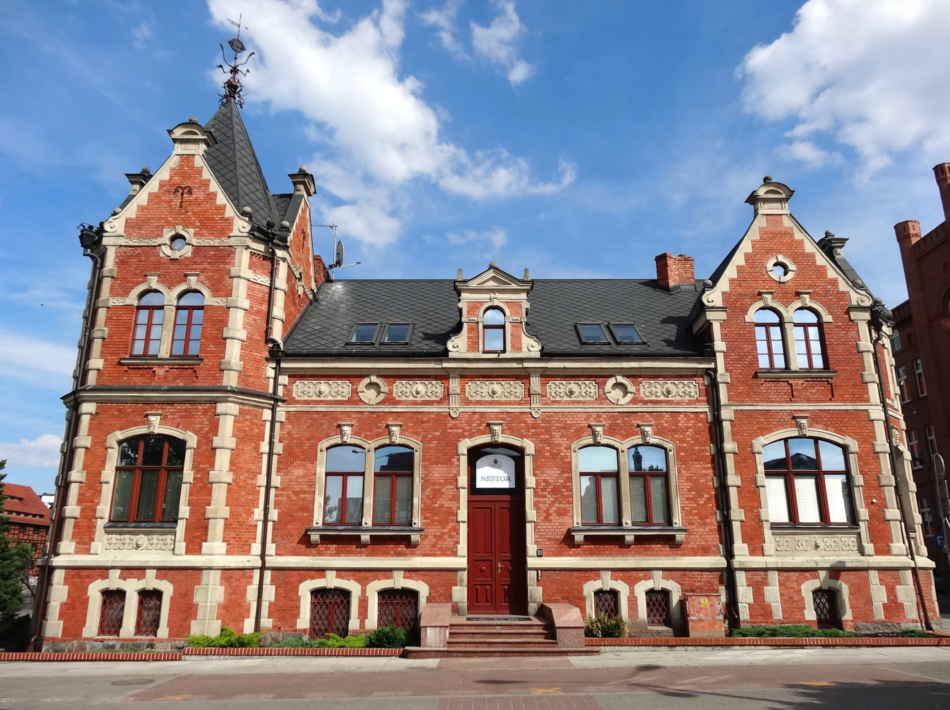 Pałacyk Lloyda w Bydgoszczy (zbud. 1886), dawna siedziba przedsiębiorstw żeglugowych, położony w strefie staromiejskiej nad Brdą.